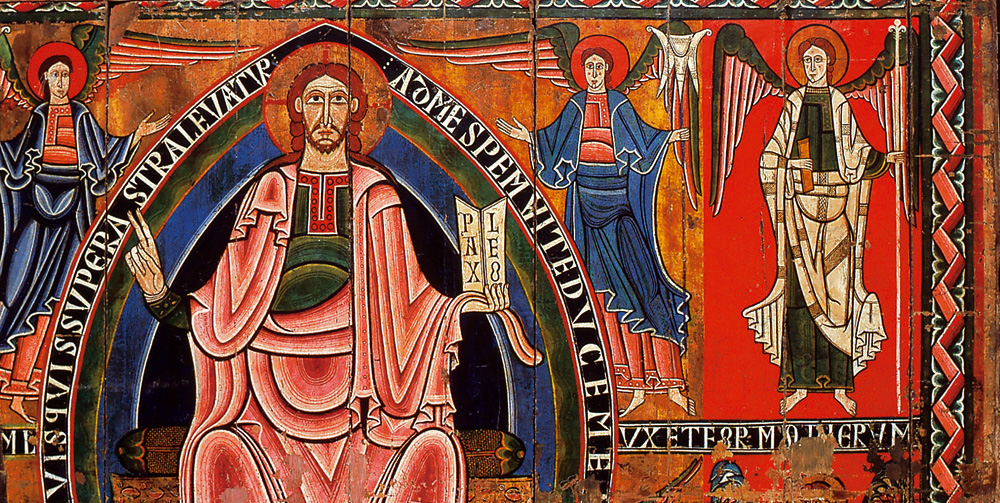 Baldaquí de Ribes- Museu Episcopal de Vic